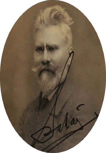 Josef Sakař (1856 - 1936), Český architekt.